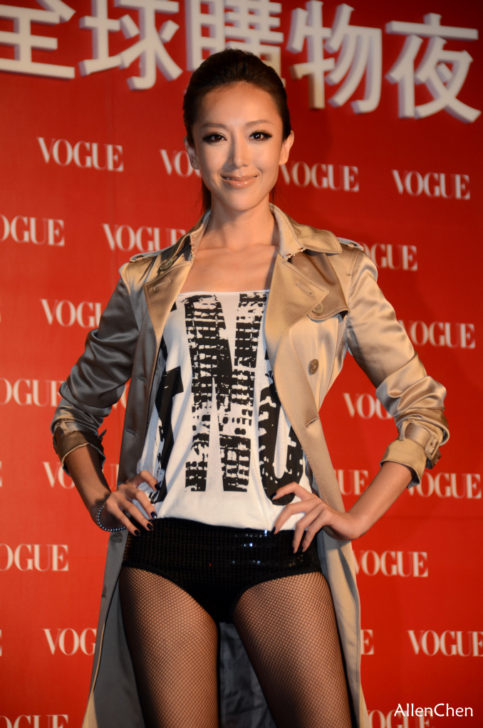 隋棠出席2011年VOGUE全球購物夜。